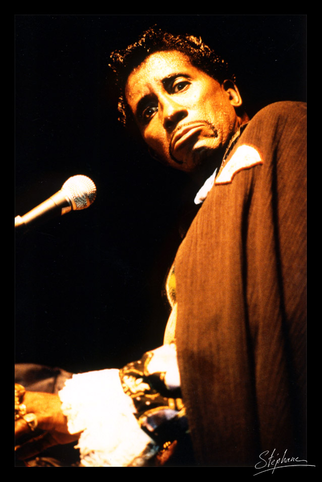 Screamin' Jay Hawkins au Festival National de Blues du Creusot (France, 71) en 1995.